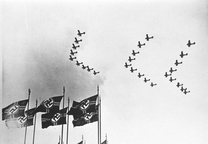 Deutsche Luftwaffe ist in fünf Jahren aufgebaut worden.